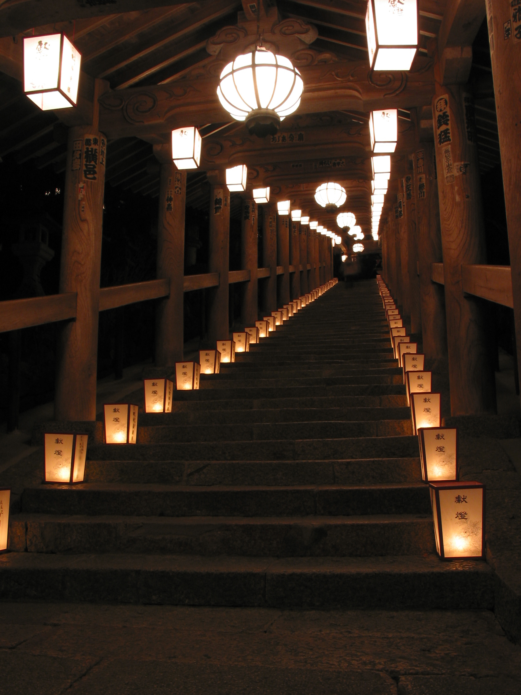 Kannon-Mantōe of Hasedera at Hase Sakurai, Nara Pref., Japan. 真言宗豊山派総本山長谷寺の観音万燈会 奈良県桜井市初瀬で撮影